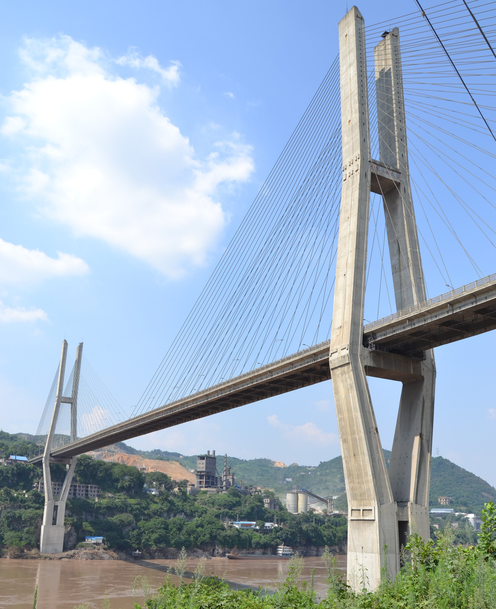 Diwei Yangtze River Bridge